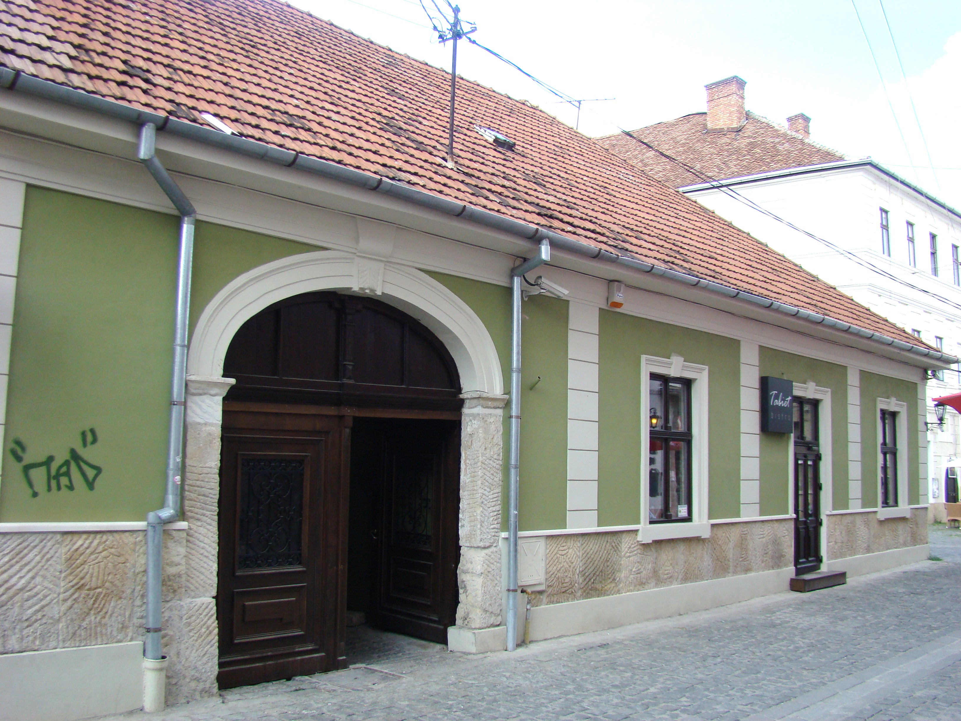 Clădire monument istoric, str. Petroșani, nr.2 (în prezent str.Virgil Fulicea)